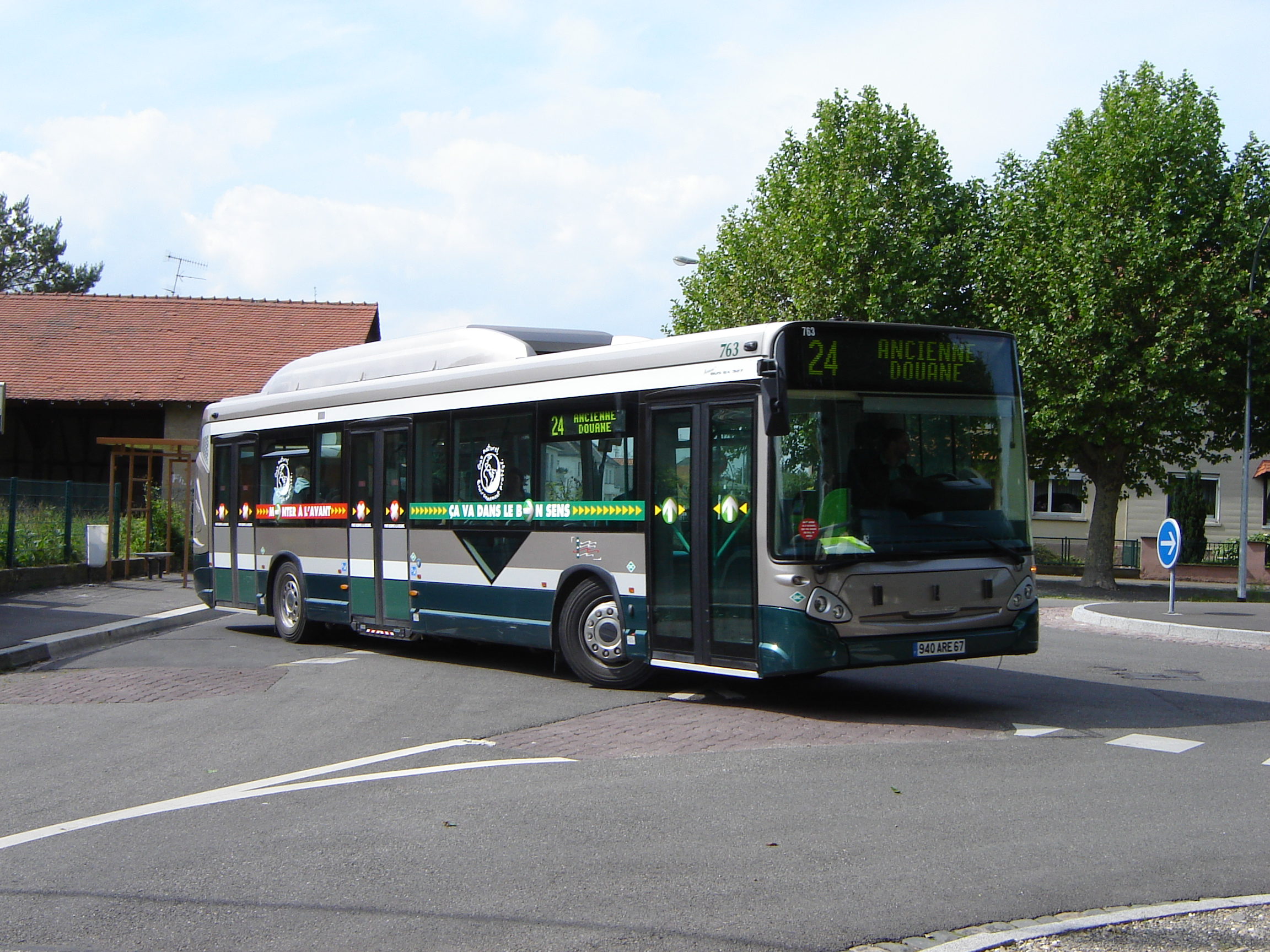 Heuliez GX 327 GNC (Gaz Naturel) à Strasbourg, Neuhof Stéphanie.